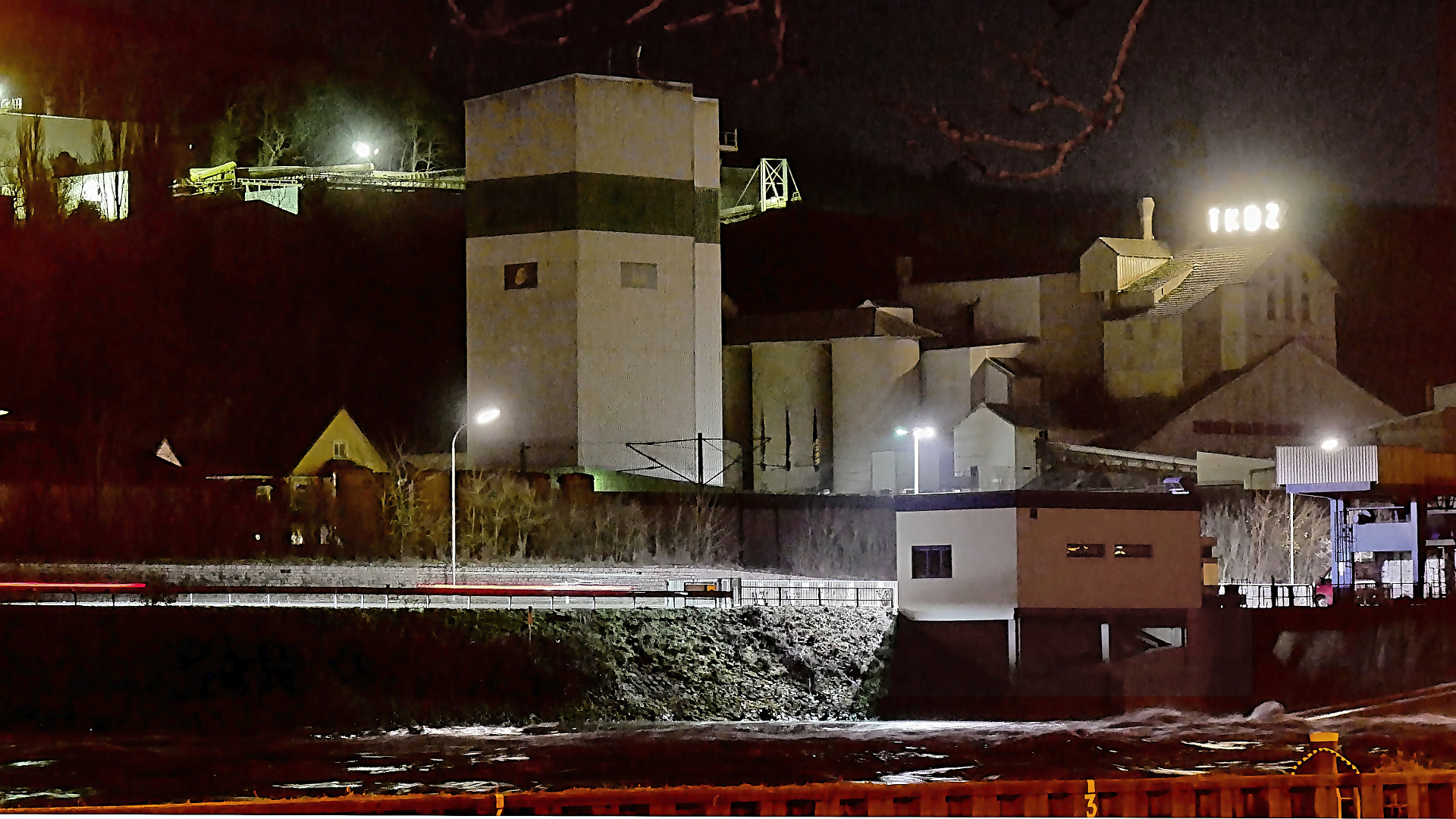 Dolomit Bergwerk in Wellen (Mosel).